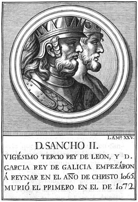 Retrato de Sancho II, vigésimo tercero rey de León, ilustración del libro (escaneado por Google) Retratos de los reyes de España, desde Atanarico hasta ... D. Carlos III.